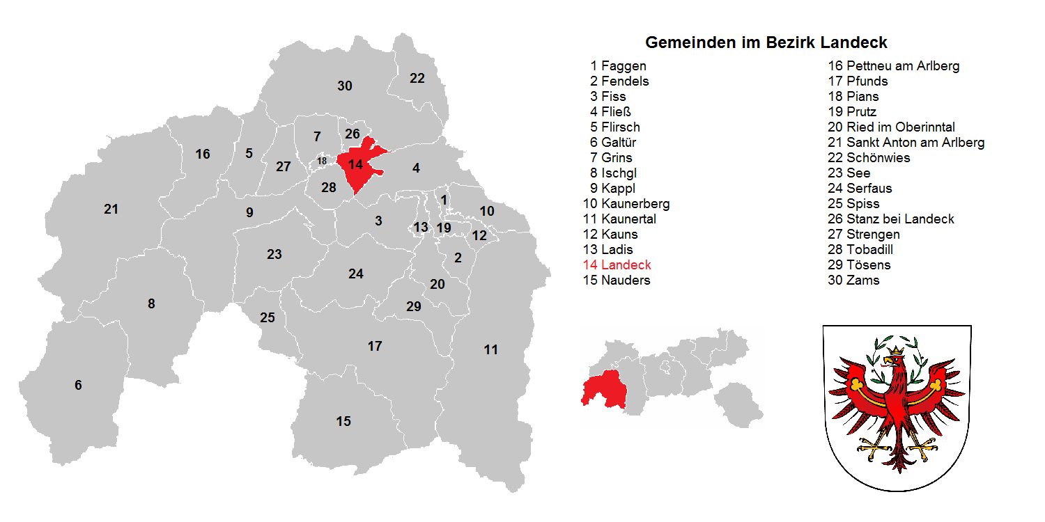 Bezirk Landeck